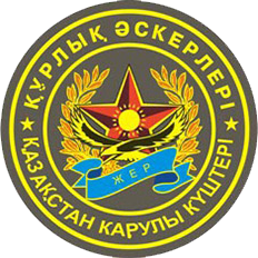 Қазақстан Республикасы Қарулы Күштерінің Құрлық әскерлері